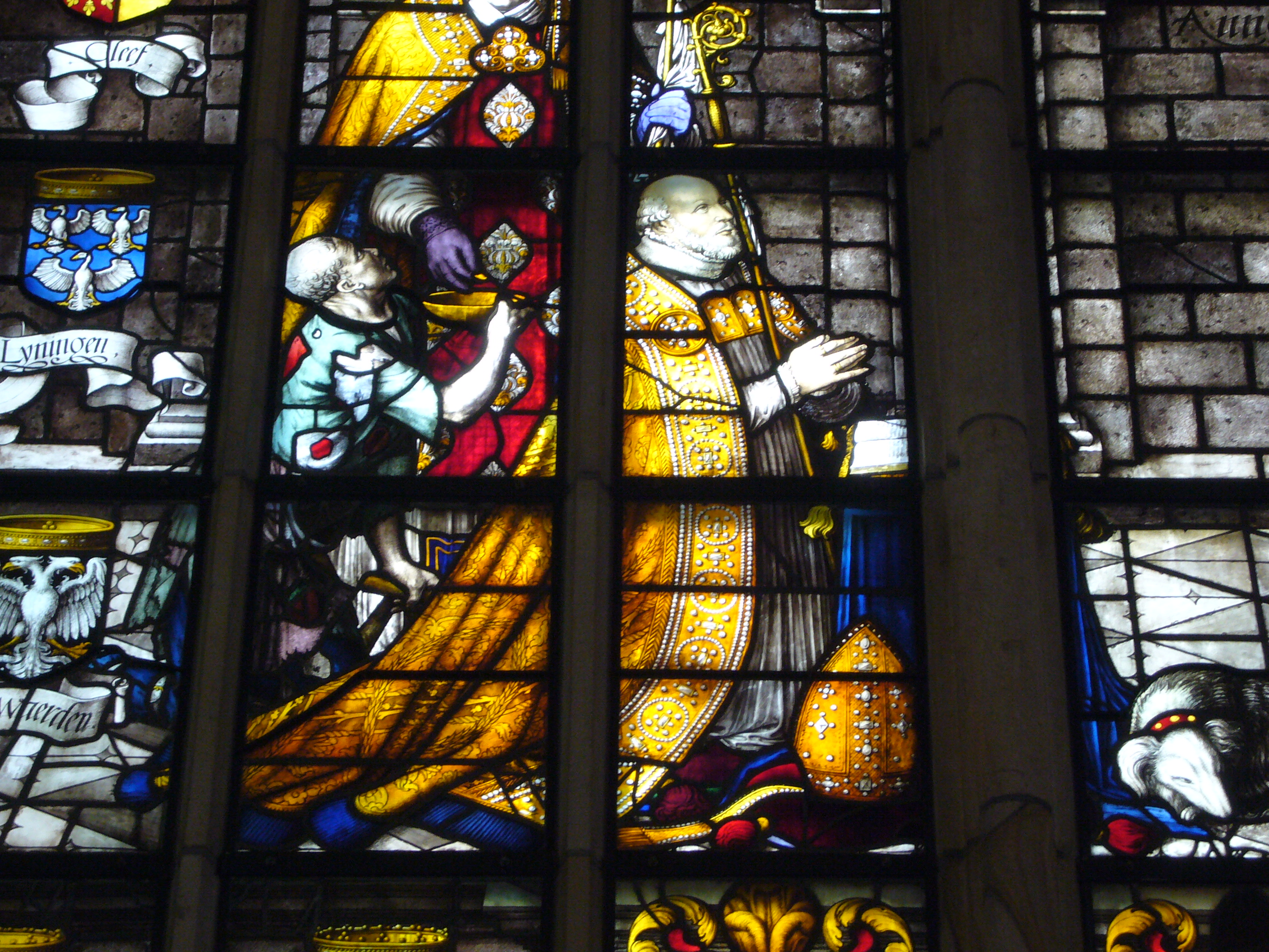 Bisschop George van Egmond van Utrecht in de Sint-Janskerk in Gouda (Glas no. 15, detail)